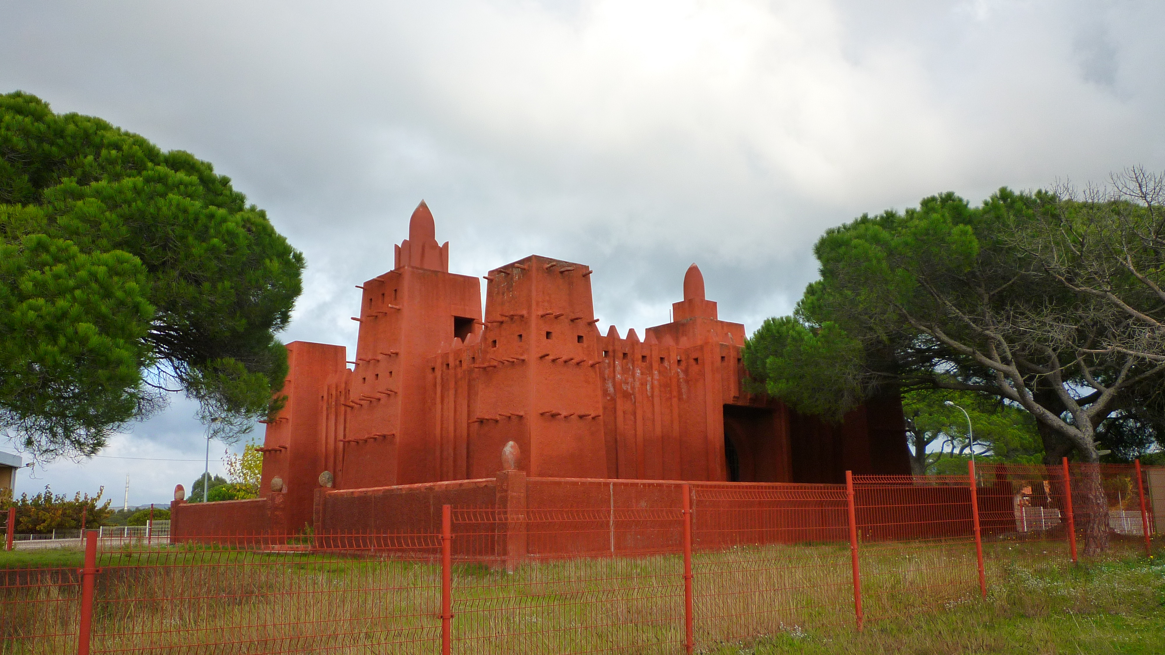 mosquée de Fréjus dans le Var